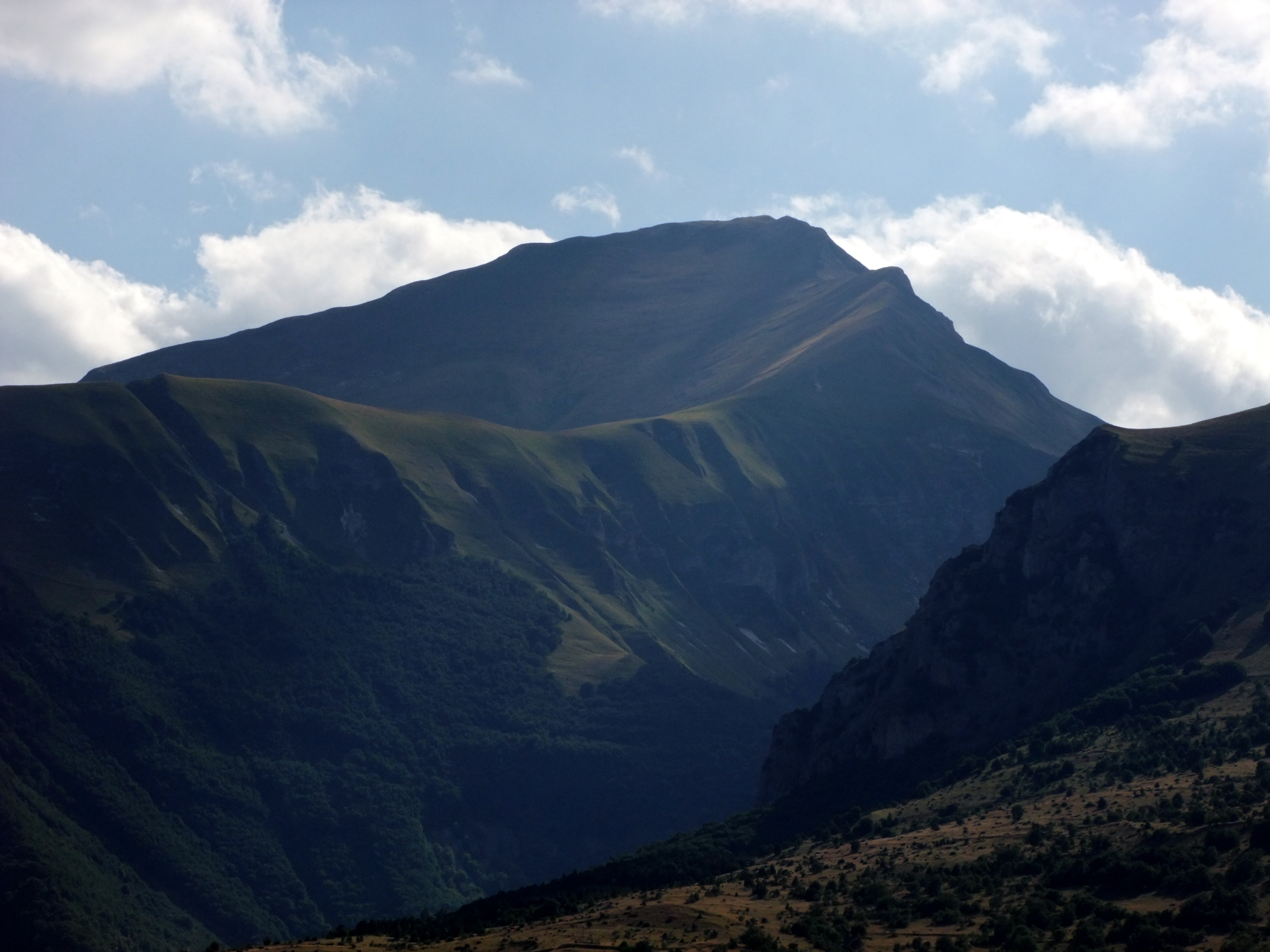 i Sibillini da Amandola